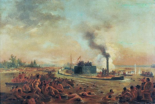 ESTUDO PARA PASSAGEM DE HUMAITÁ, Óleo sobre madeira - 44,2 x 67,5 cm